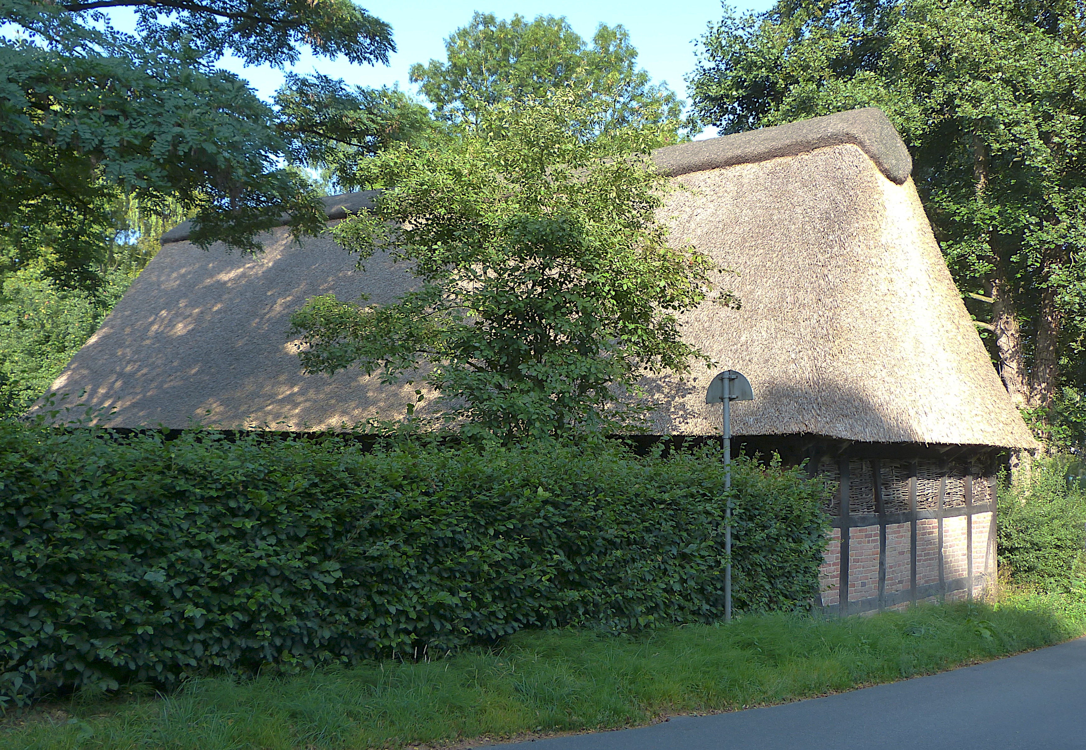 Scheune in Bremen, Im Dorfe 6Das abgebildete Objekt ist ein geschütztes Kulturdenkmal in der Freien Hansestadt Bremen, mit der Nr. 2287 beim Landesamt für Denkmalpflege registriert.